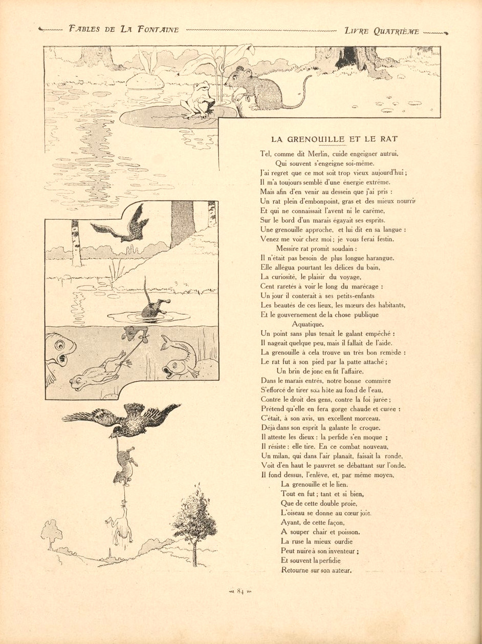 Fables de La Fontaine illustrées par Benjamin Rabier : La grenouille et le rat.